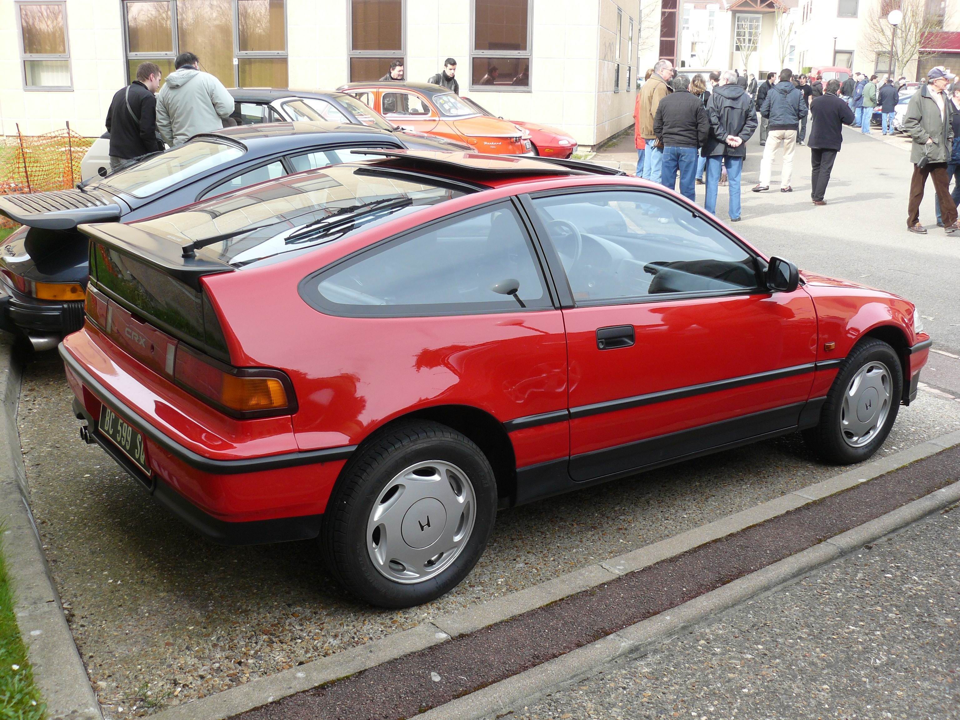 Bailly 2011